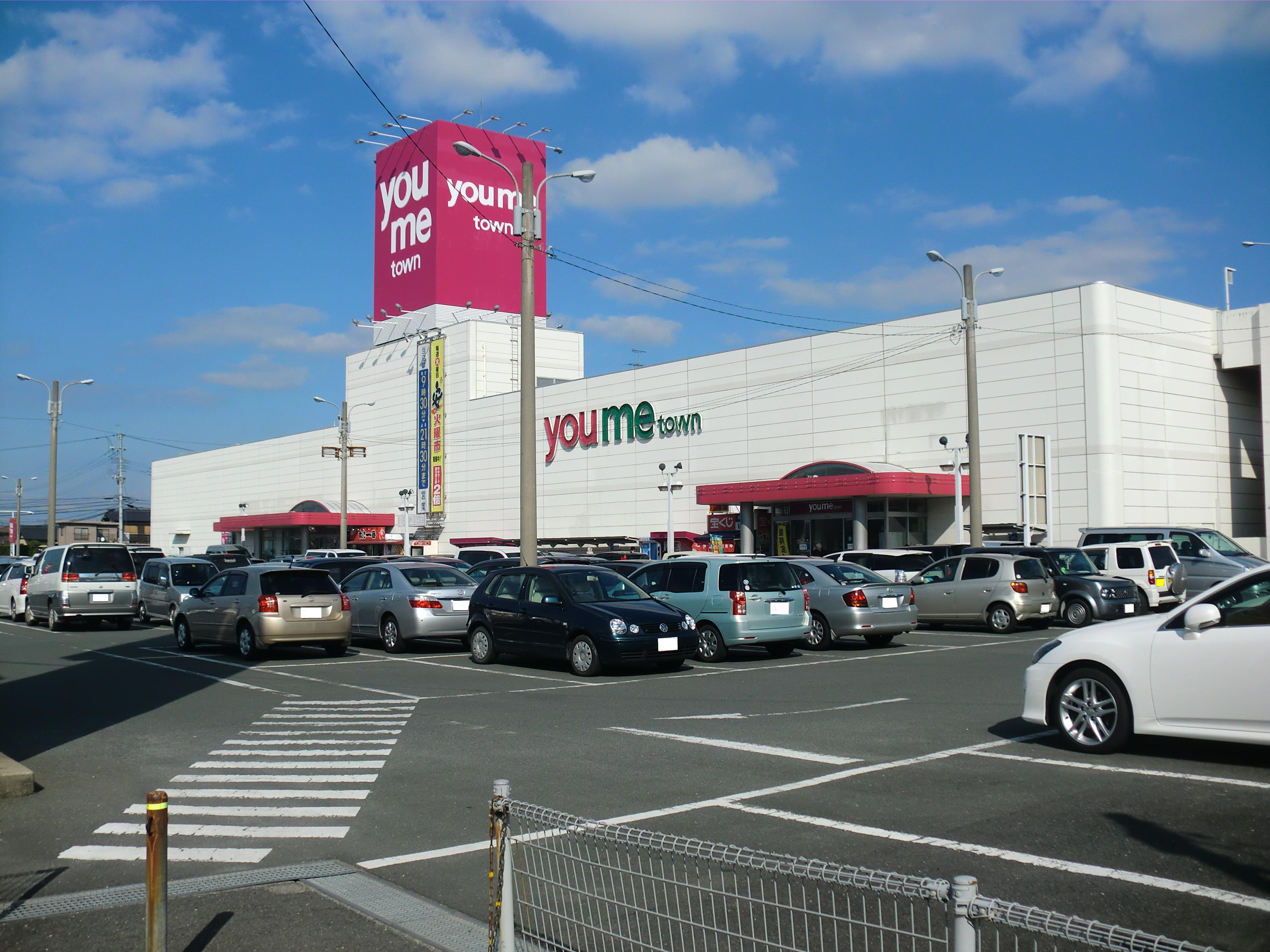 福岡県遠賀郡遠賀町にあるゆめタウン遠賀（おんが）